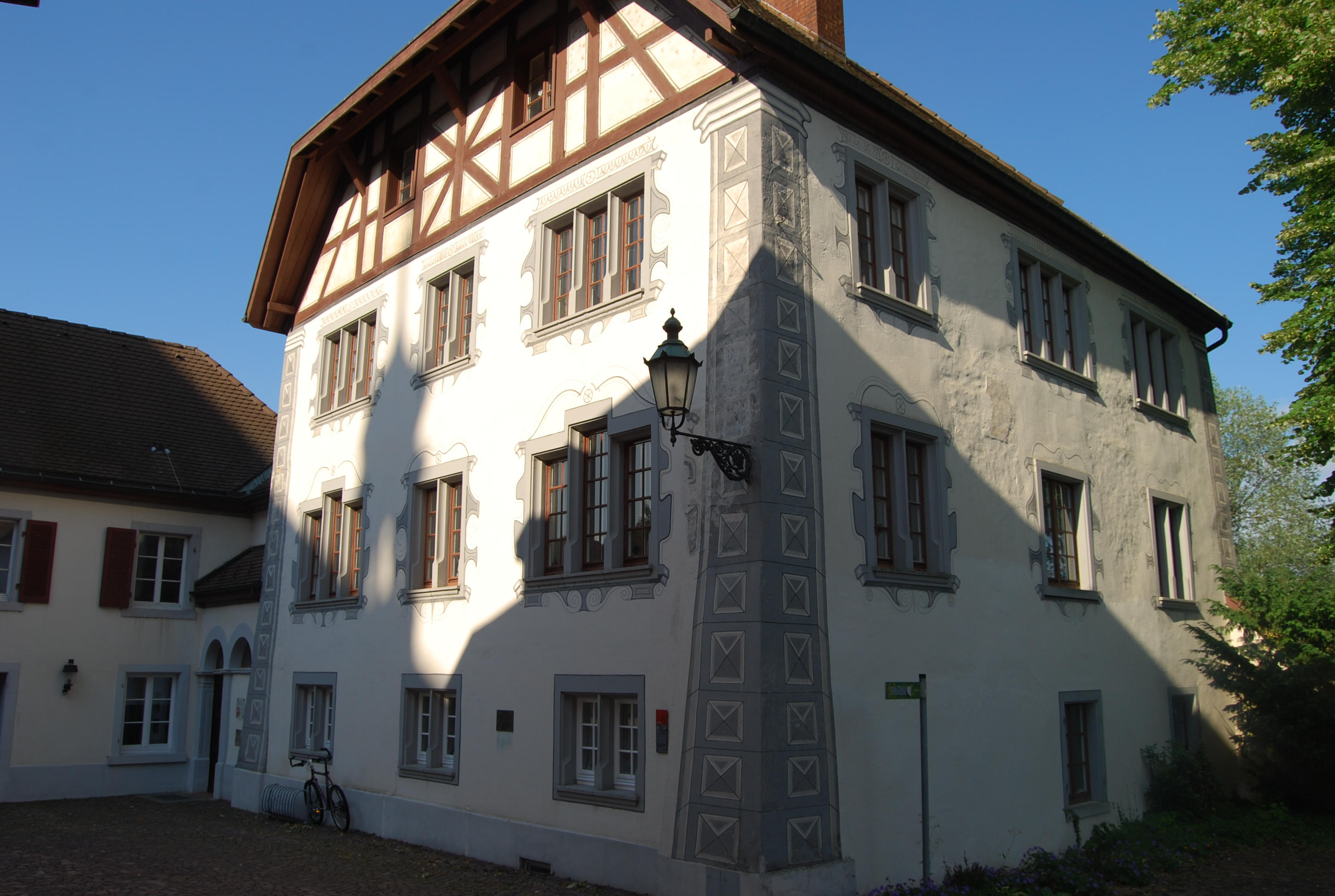 Alter Hof Stift Säckingen